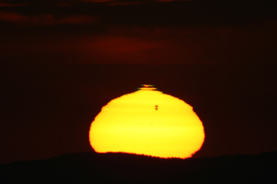 Venustransit am 06.06.2012 bei Sonnenaufgang über Dresden.